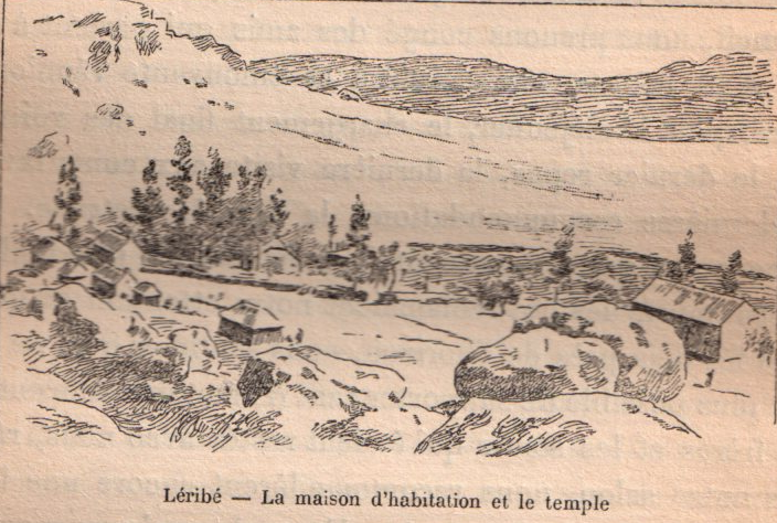 Le temple et le village de Léribé.